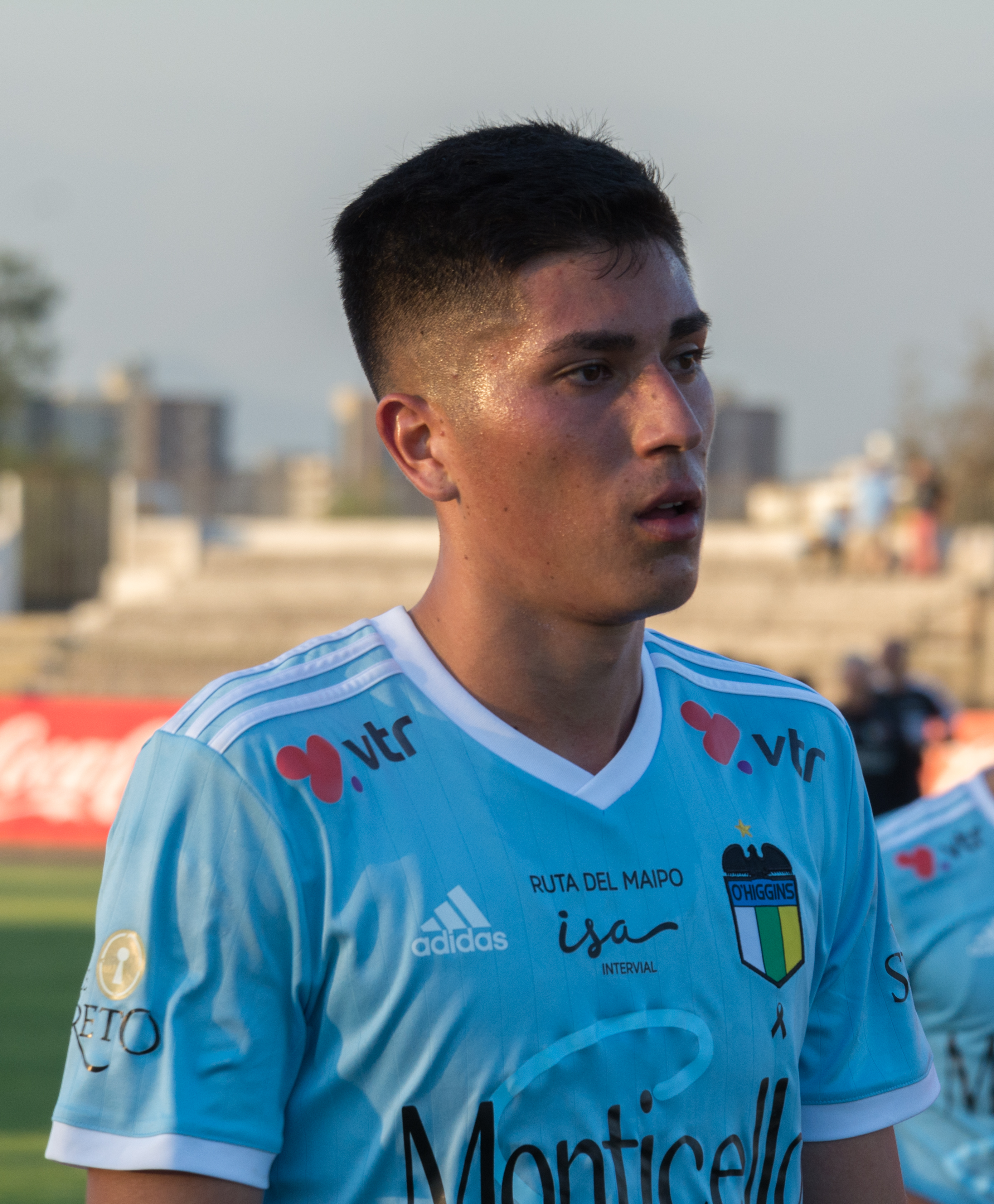 Matías Sepúlveda, Palestino v O'Higgins, Estadio Municipal de La Cisterna, La Cisterna, Santiago, Chile.